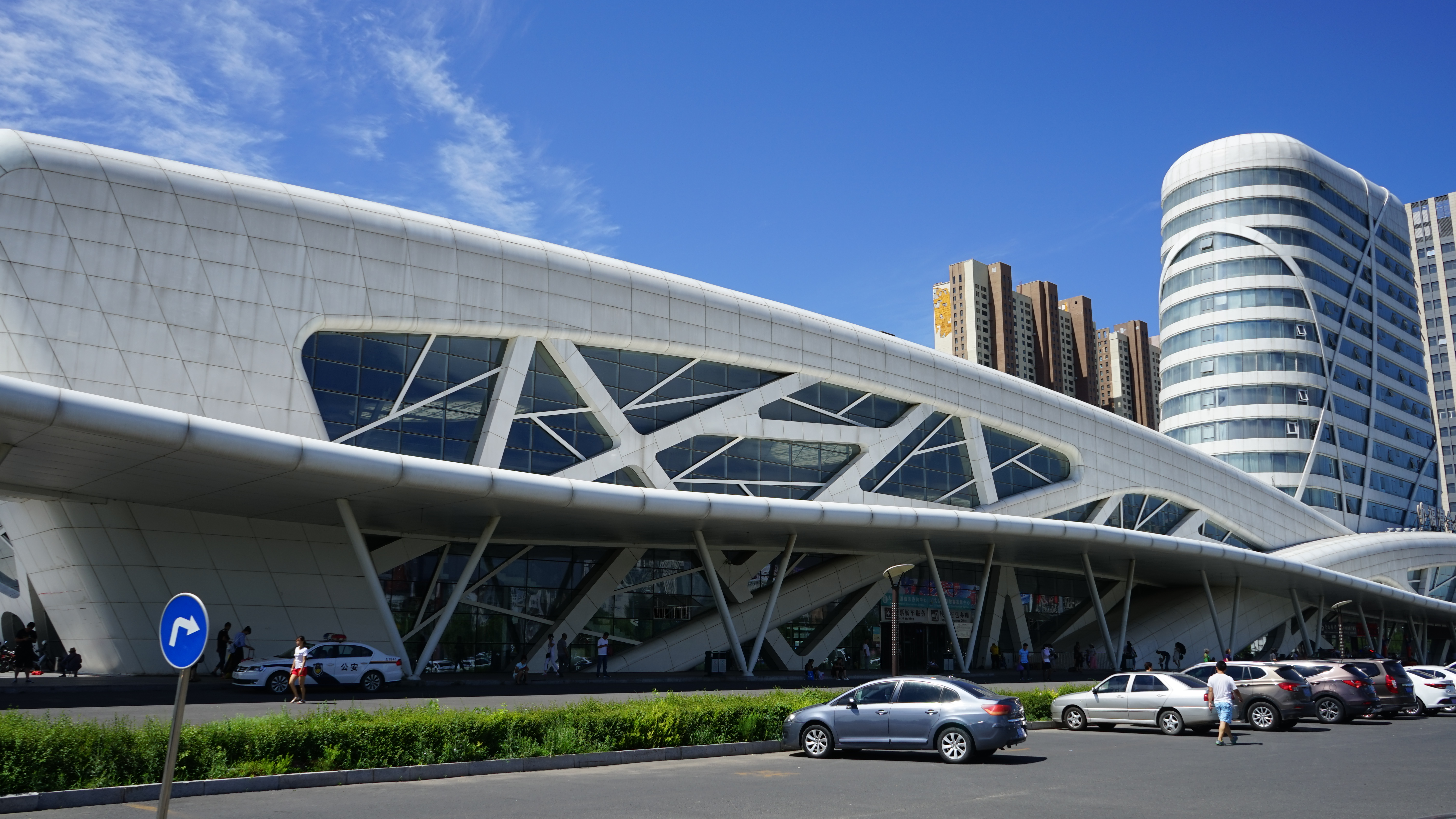 中文（中国大陆）: 大庆客运枢纽站